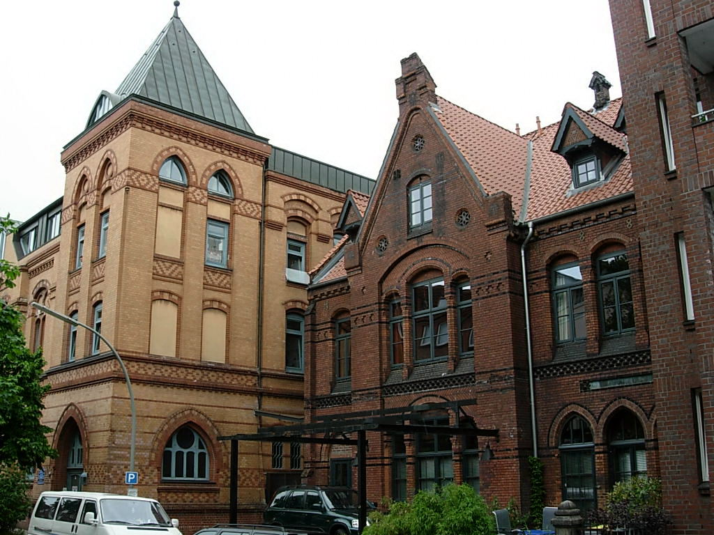 Die 1830 gegründete Speiseanstalt Altona gab seit 1880 im Gebäude Billrothstraße 77 in Altona-Altstadt, erbaut von Zimmermeister Voss, ein tägliches Mittagessen an Bedürftige aus. Daneben residierte seit 1888/89 mit dem 1877 gegründeten Verein Stadtmission eine weitere soziale Einrichtung. Beide Gebäude wurden im Stil der Neogotik errichtet. This is the photograph of an architectural monument. It is part of the list of cultural monuments of Hamburg, no. 691